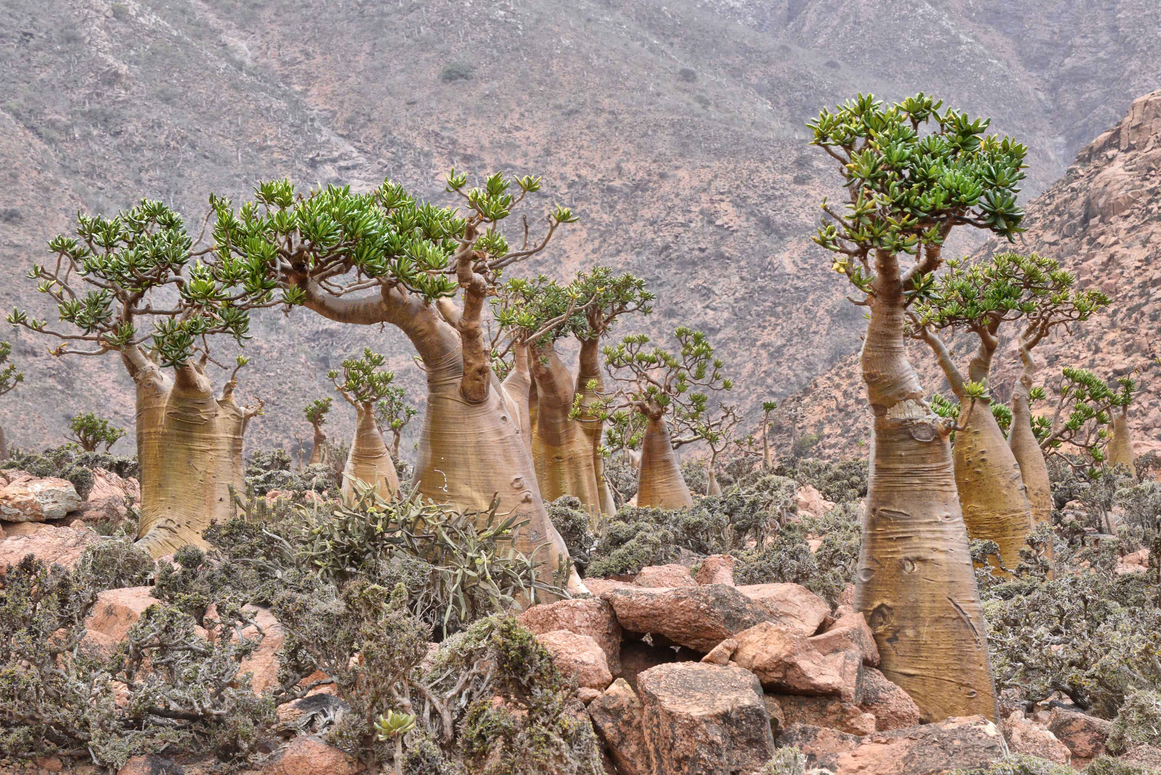 Yemen